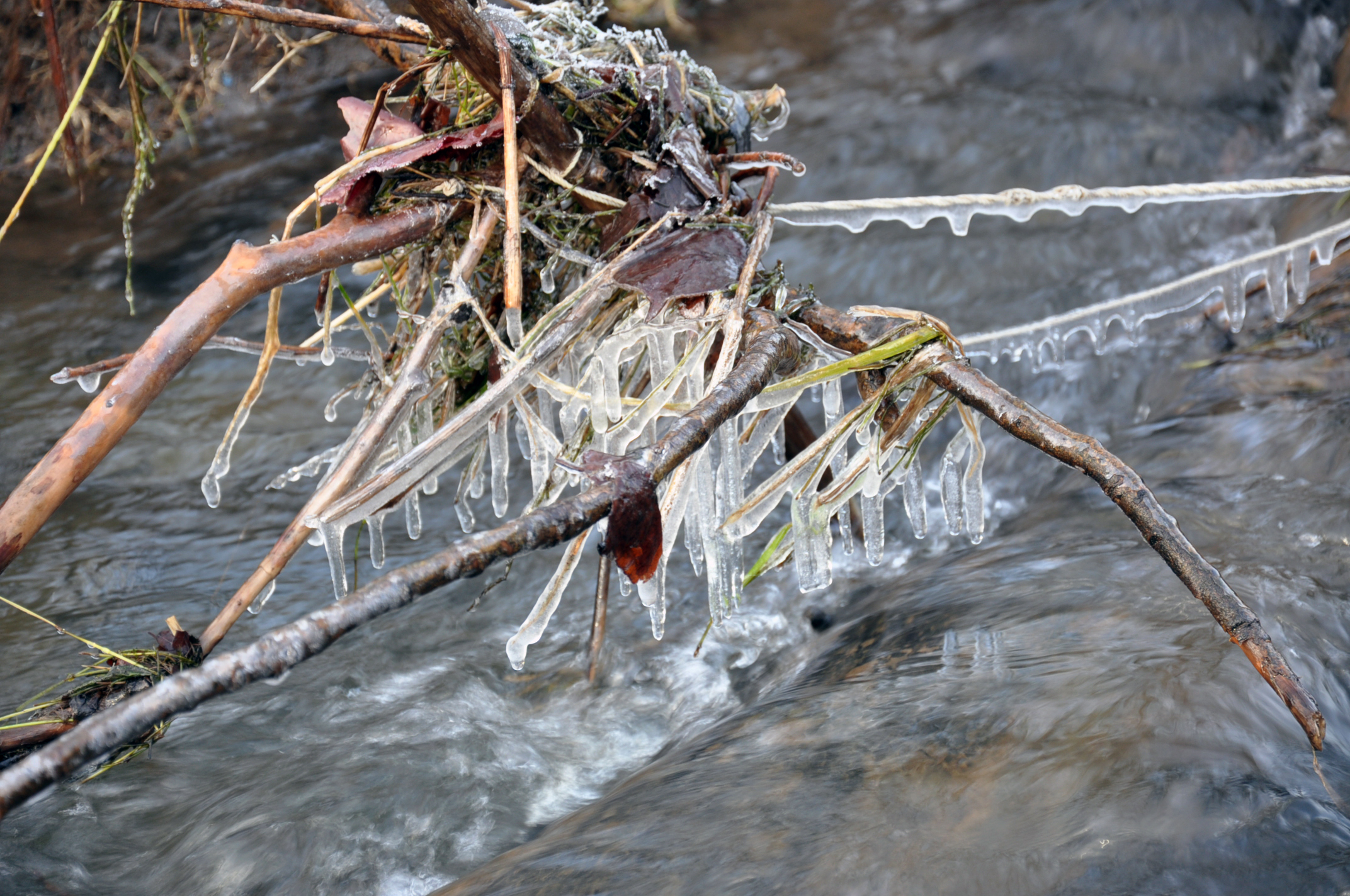 Ruhrwiesen bei Essen Rellinghausen, Eiszapfen